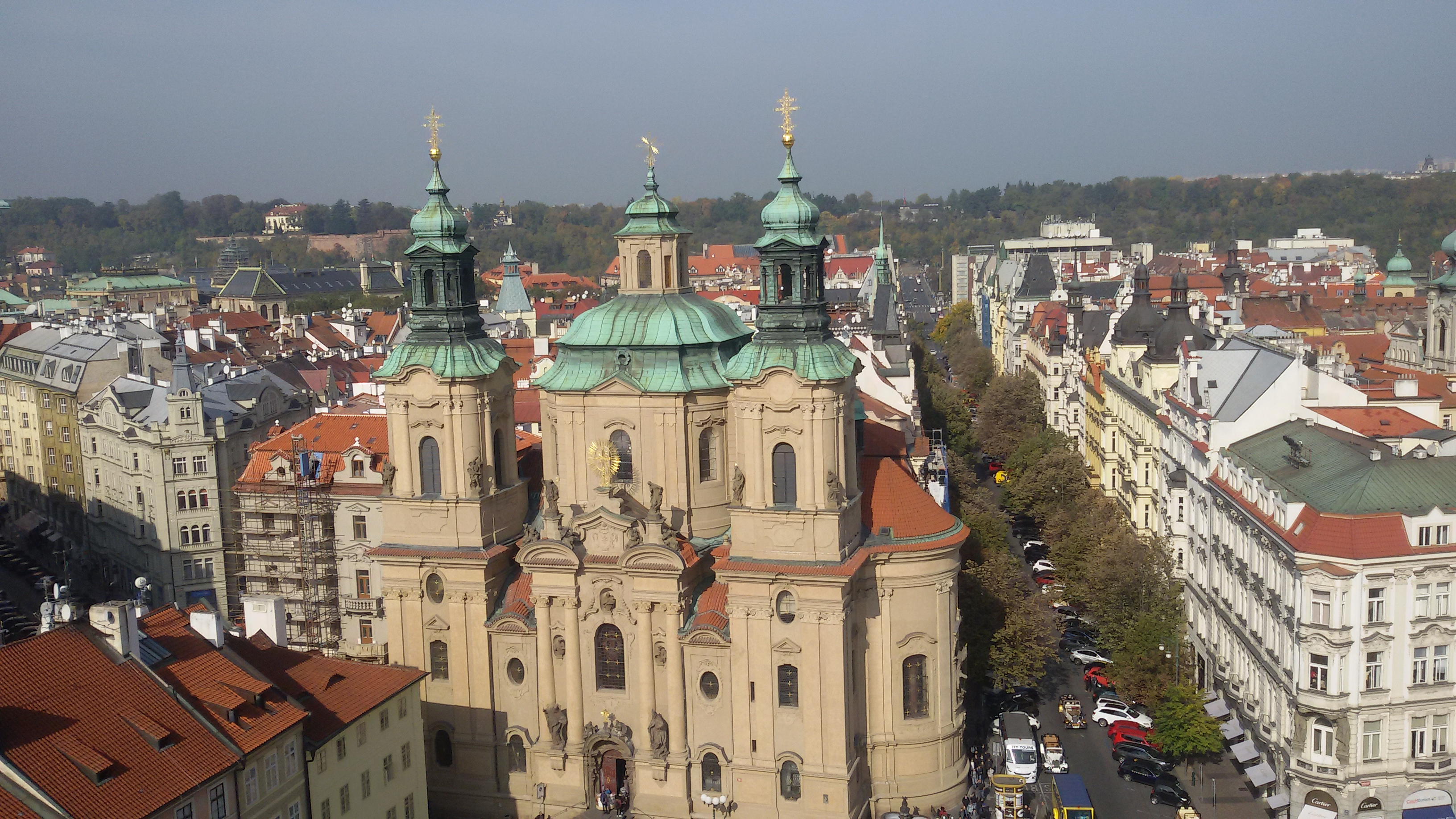 View of St. Nicholas church from the top of Old Town Hall.